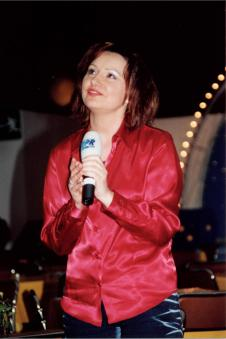 Die Sängerin und Textdichterin bei einem ihrer Auftritte